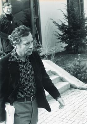 Robert Aumann 1977 in Oberwolfach